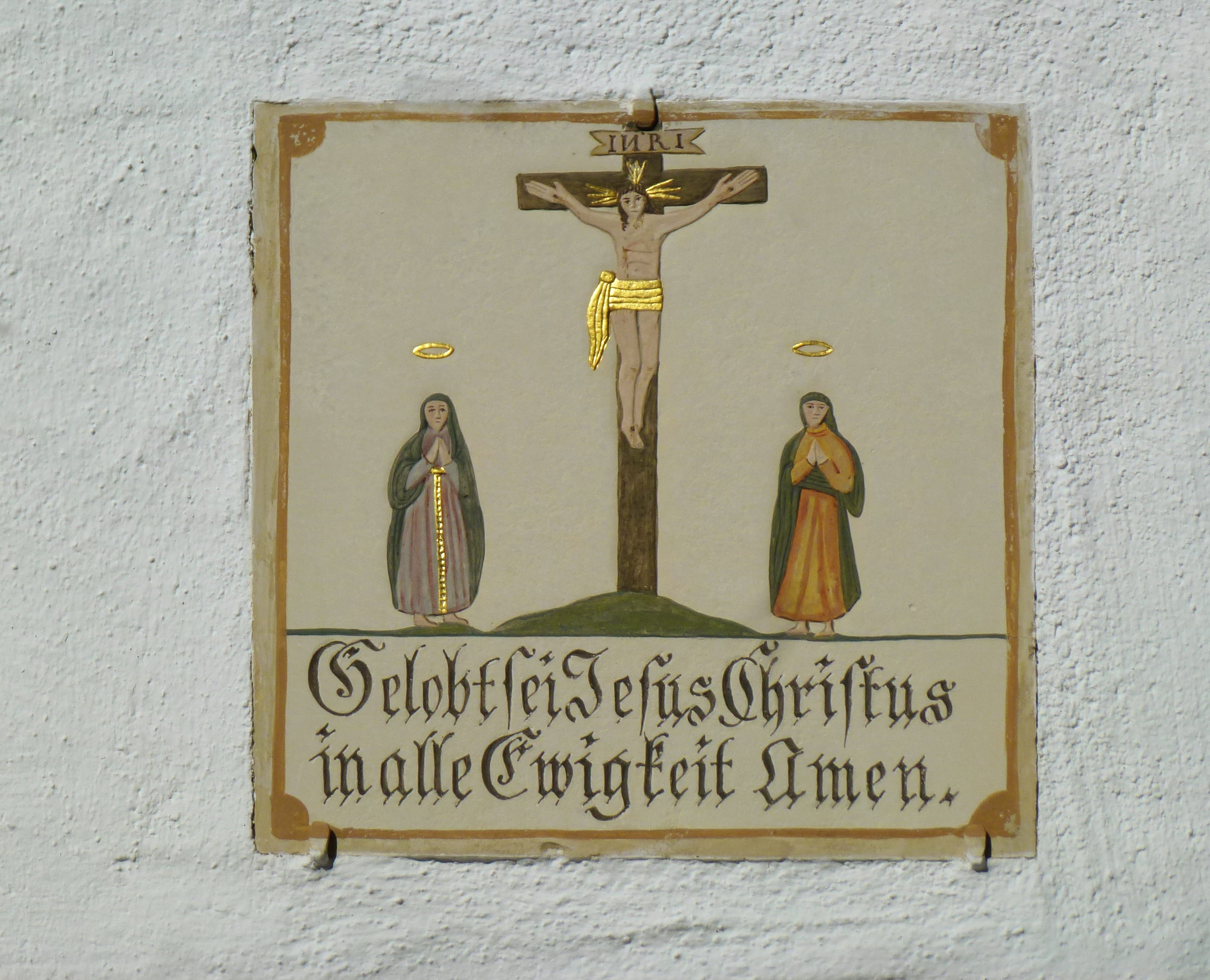 Sulzemoos, Kirchstr.5: Ehemaliges Pfarrhaus. Detail: Dachauer Haustafel aus der Mitte des 19.Jhdts.